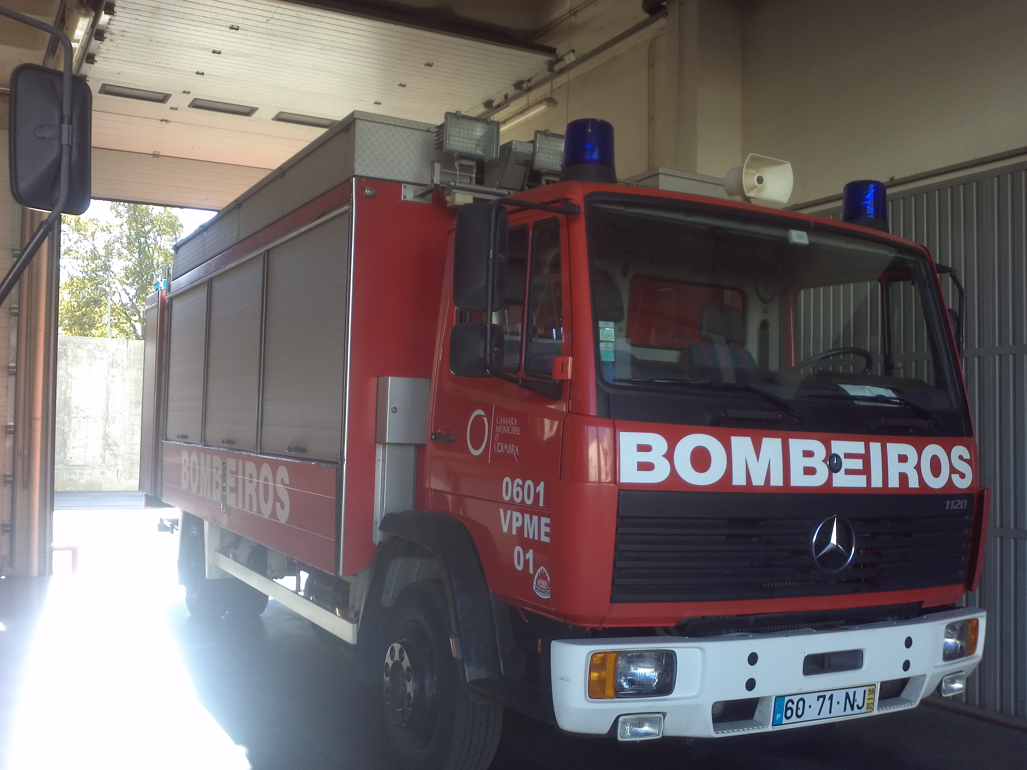 Veiculo Protecção Multiriscos Especial 01